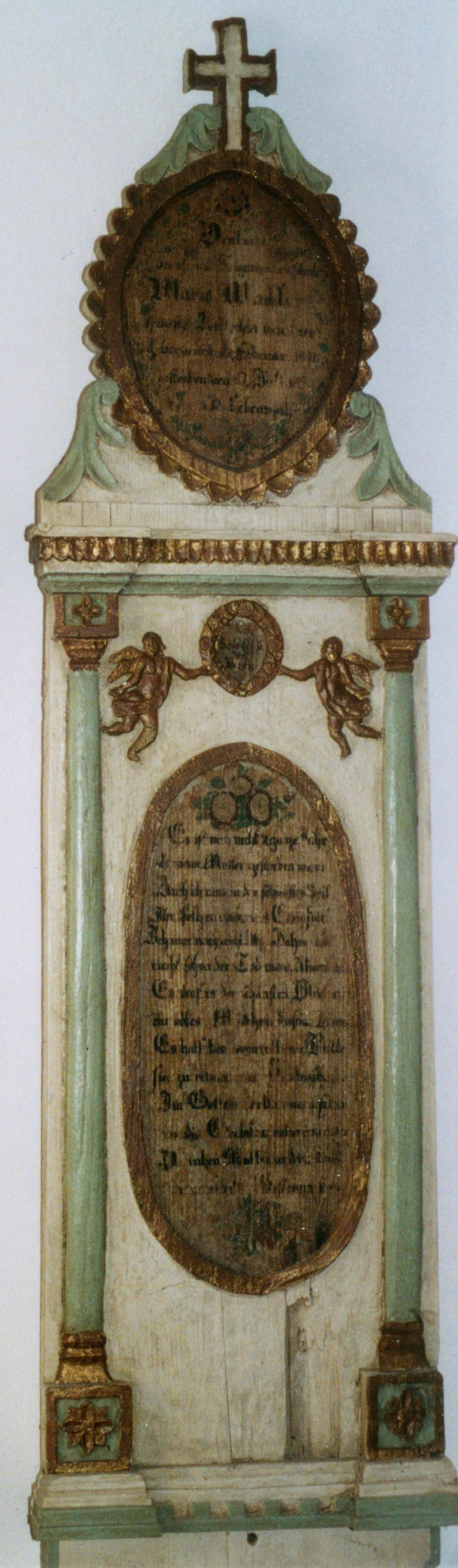 restauriertes Totenbrett, ca. 1840, Wenigmünchen, Kreis Fürstenfeldbruck, Oberbayern